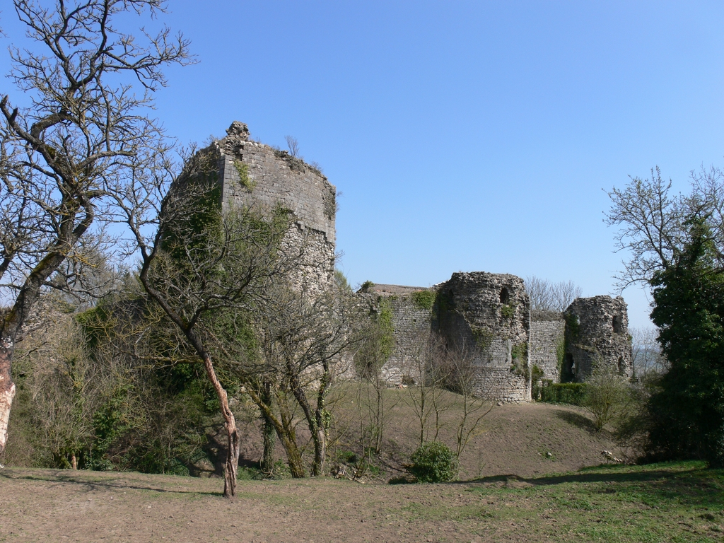 Château de Prény, premier château des Ducs de Lorraine